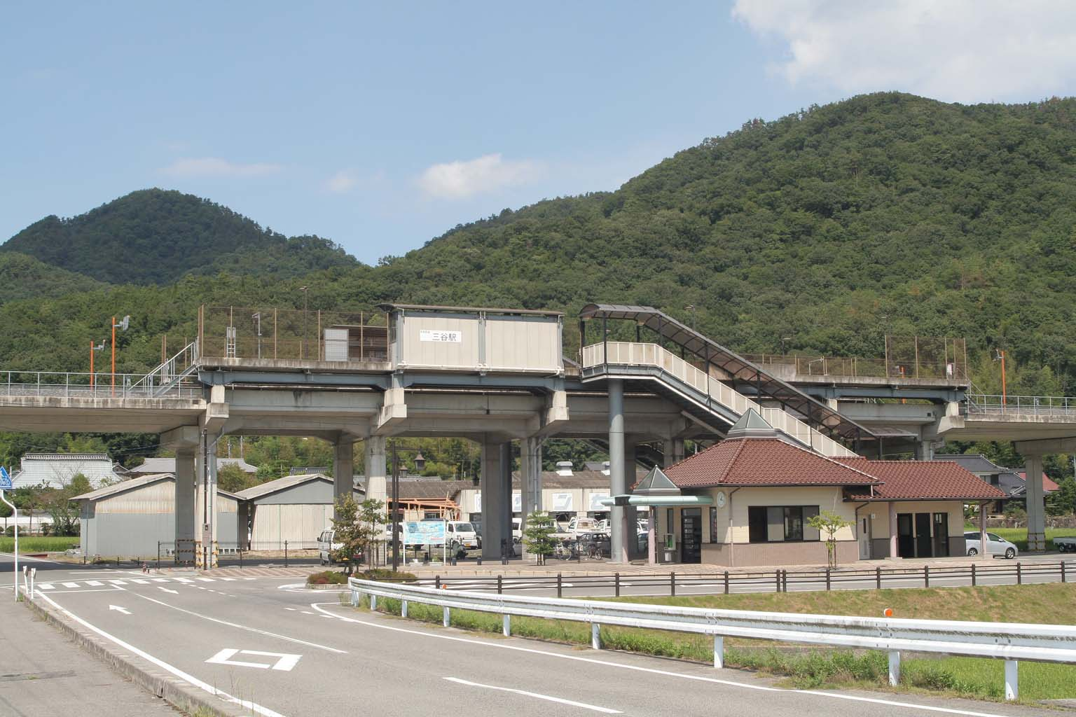 三谷駅の全体の様子